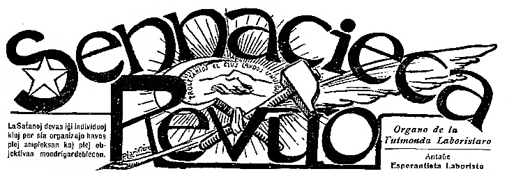 Emblemo de Sennacieca Revuo, 1922